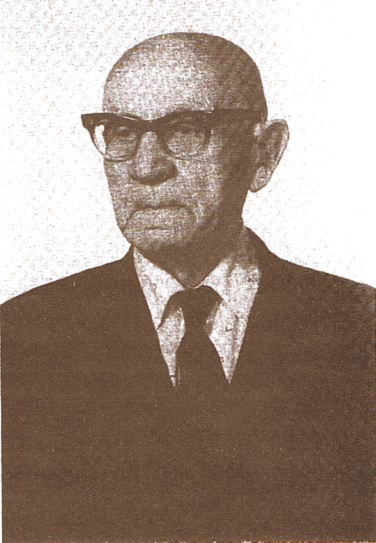 Antoni Pajdak (1894-1988)